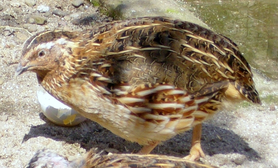 Wachtel in Haltung